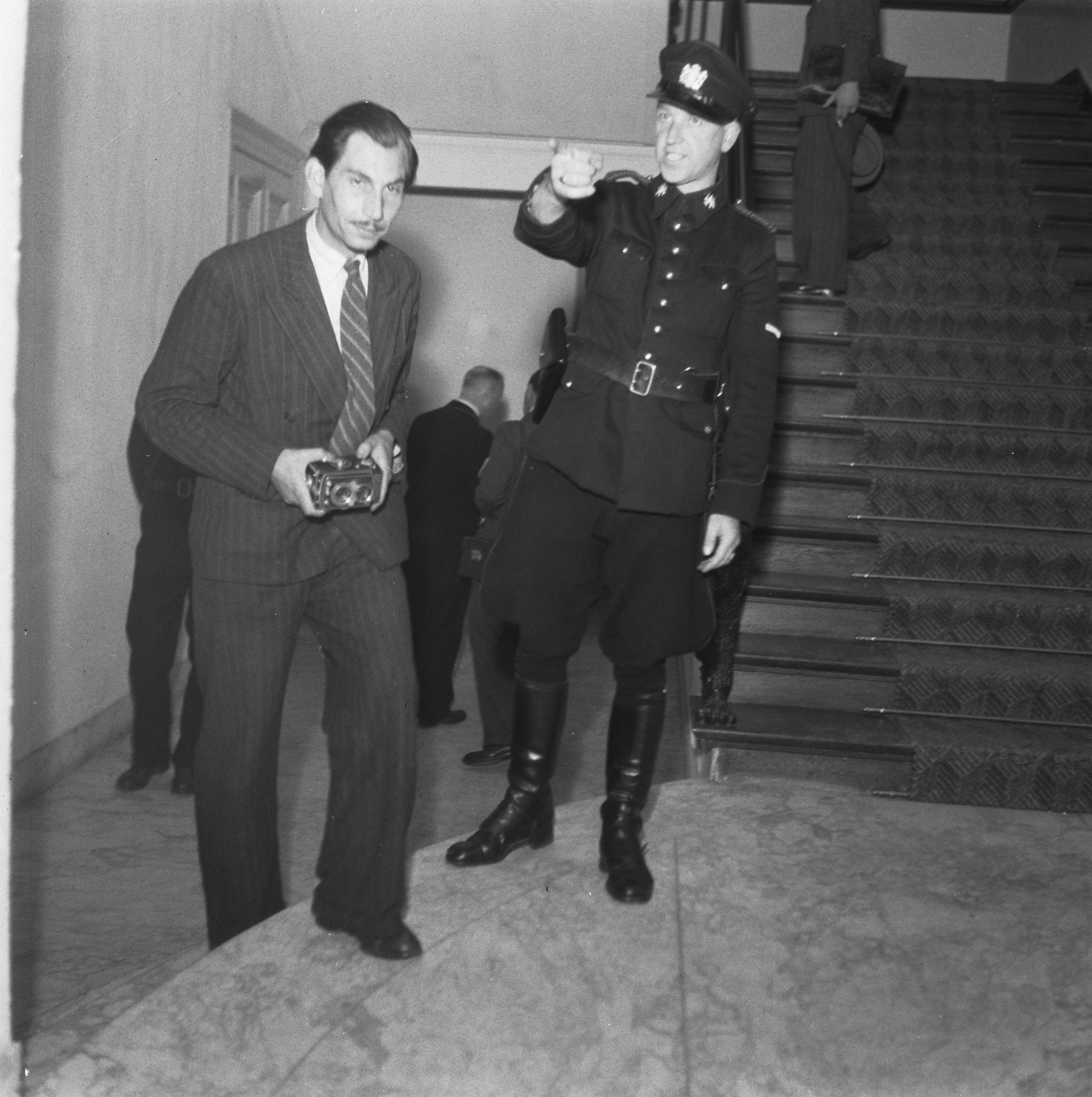 Fotograaf Carel Blazer tijdens het proces tegen Max Blokzijl, 11 september 1945